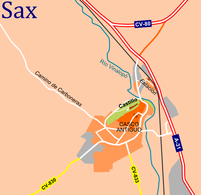 Plano de accesos de Sax